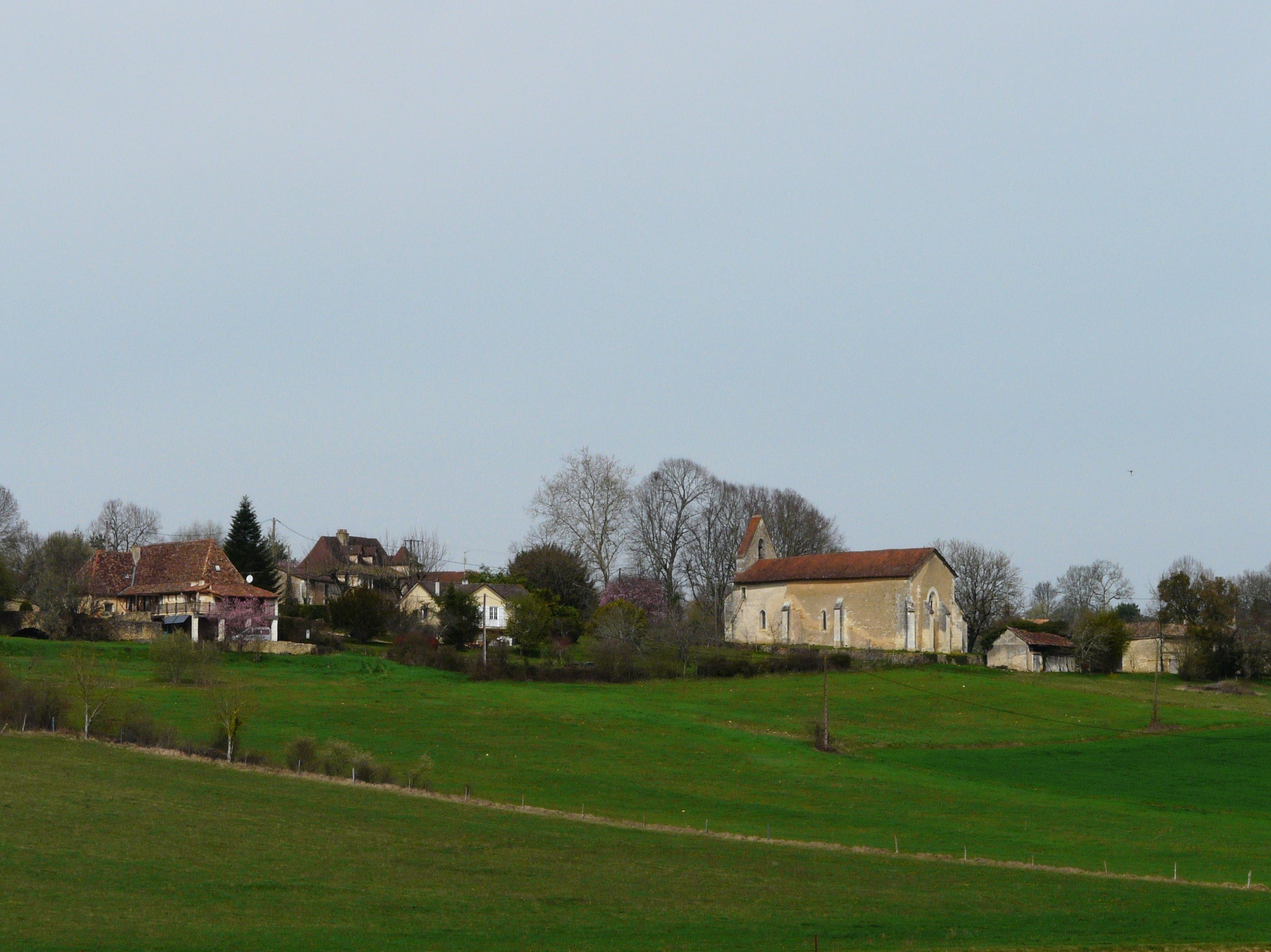 Le village de Douville vu du sud-est, Dordogne, France.